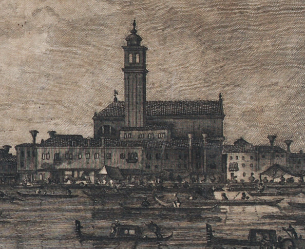 Giambattista Brustolon, Festa notturna del Redentore, 1779, incisione, particolare